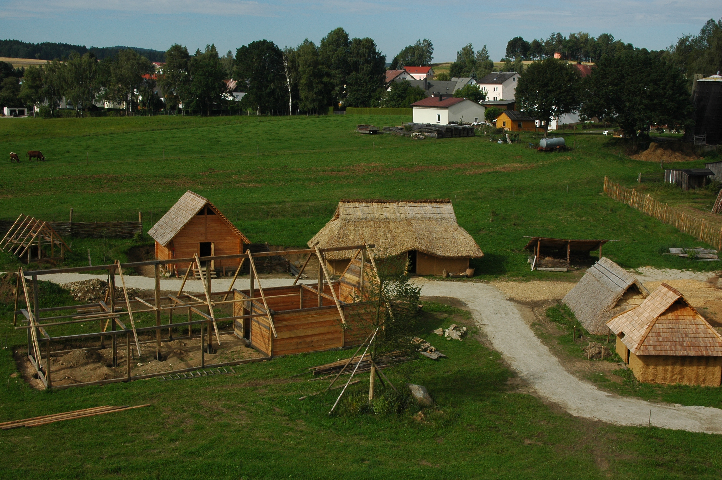 Die slawische Frühmittelaltersiedlung im Geschichtspark Bärnau-Tachov